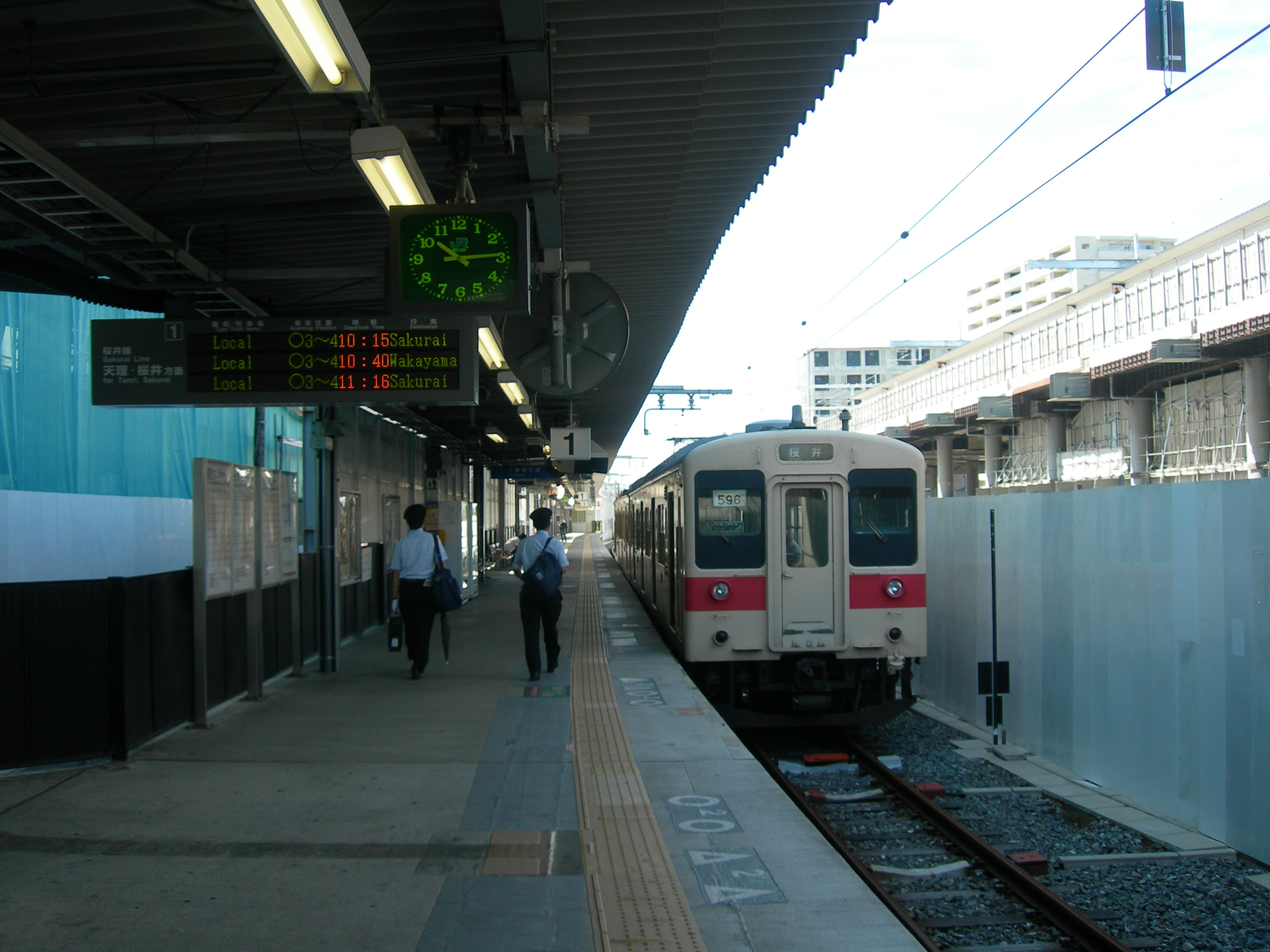 地上仮駅時代の奈良 桜井線 プラットホーム